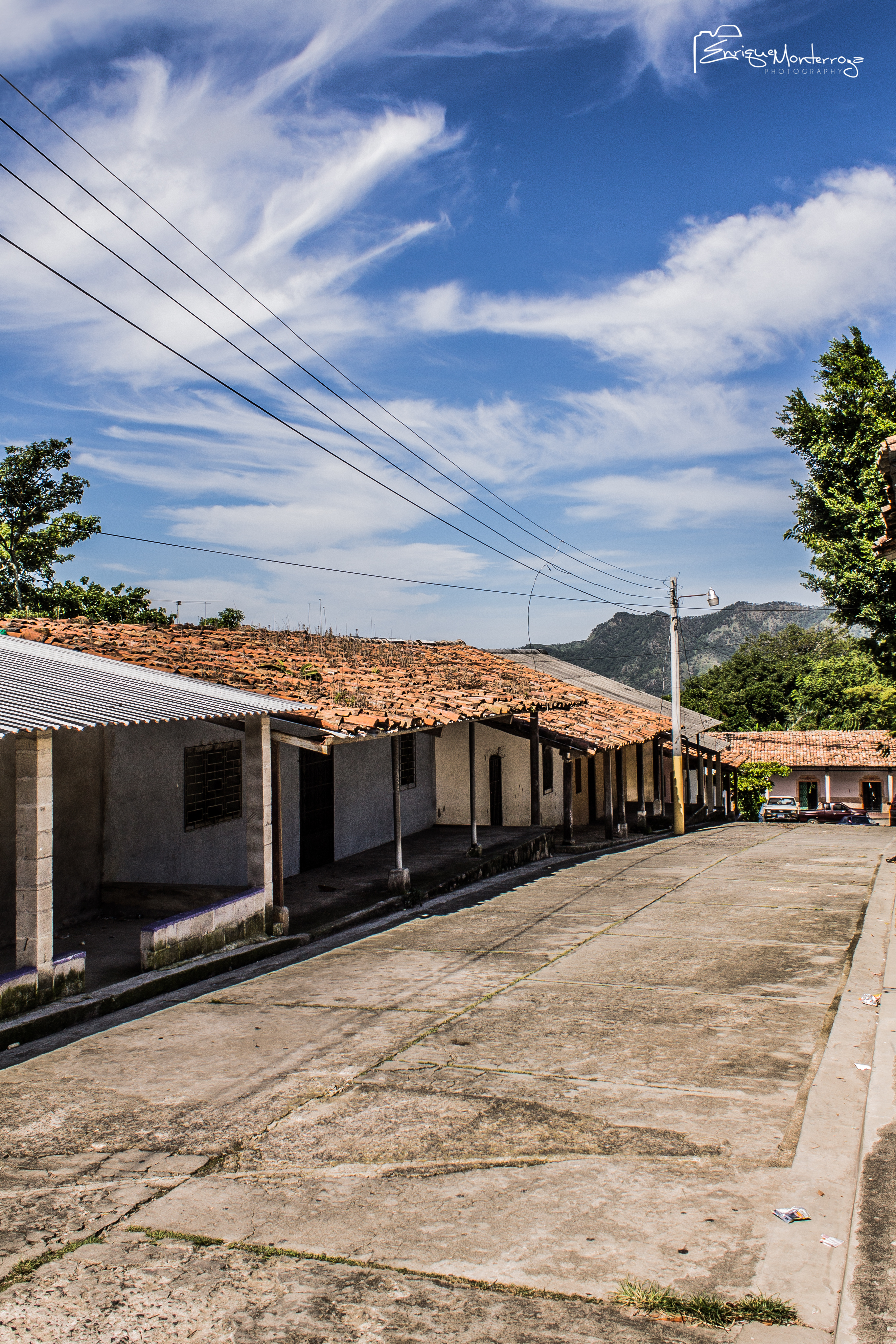 Calles y casas del pueblo de San Ignacio en Chalatenango.